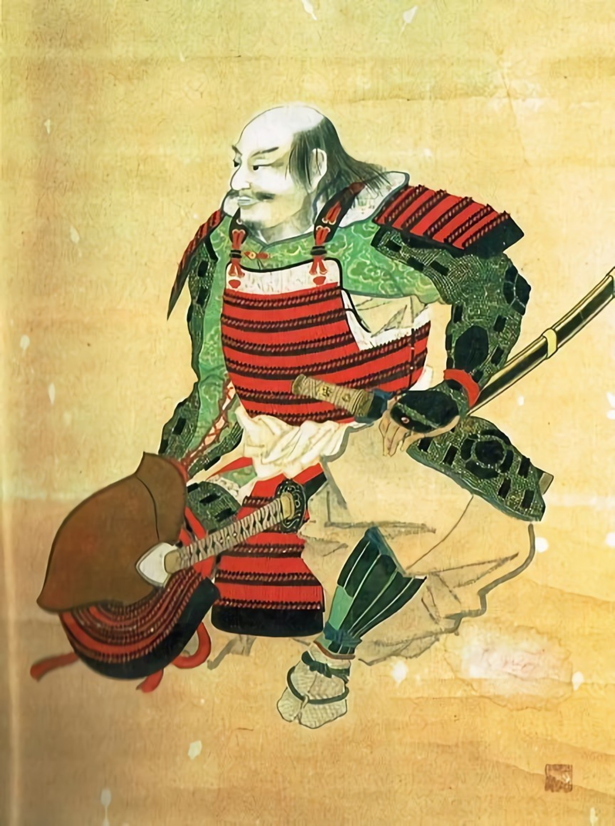 内藤修理昌豊の肖像画